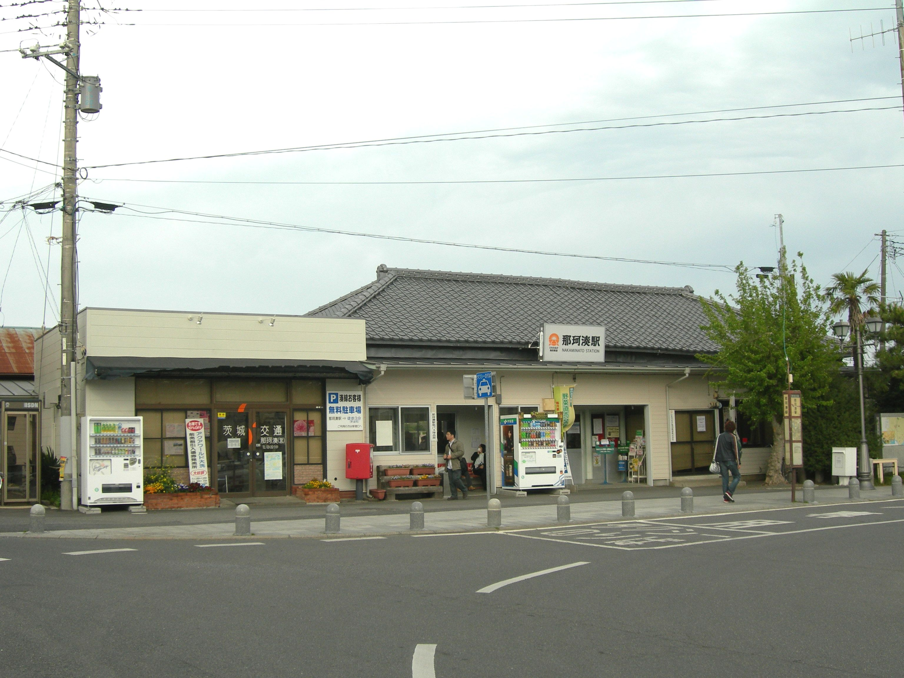 那珂湊駅